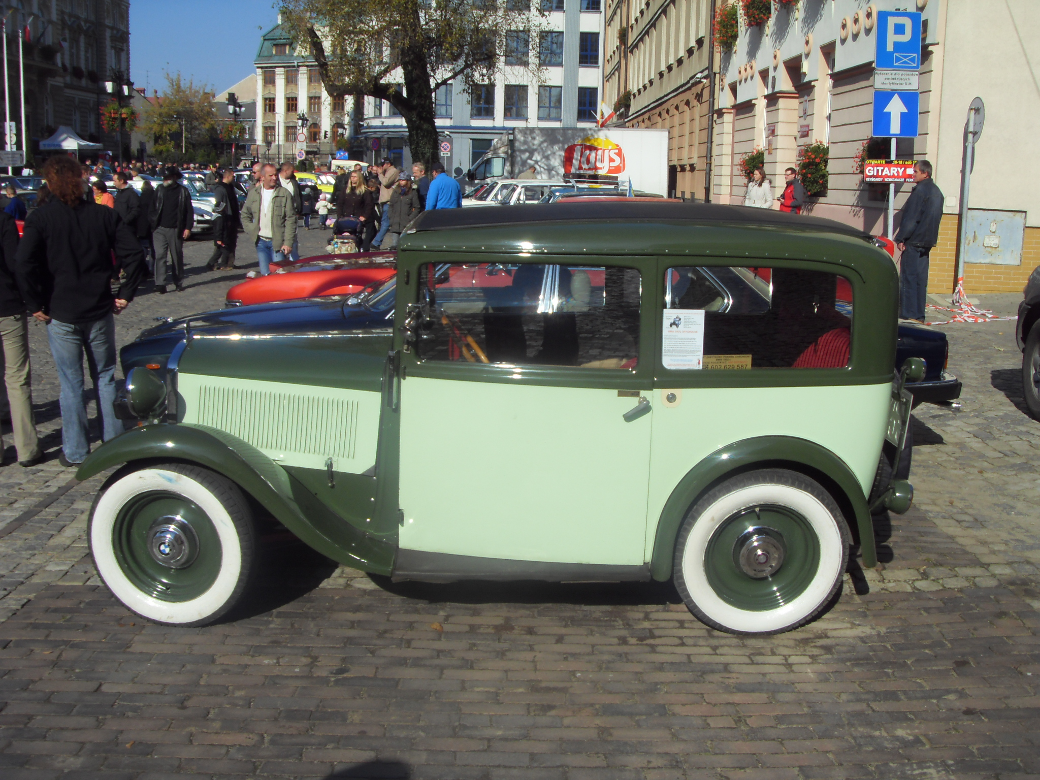 BMW AM4 na II Beskidzkim Zlocie Pojazdów Zabytkowych